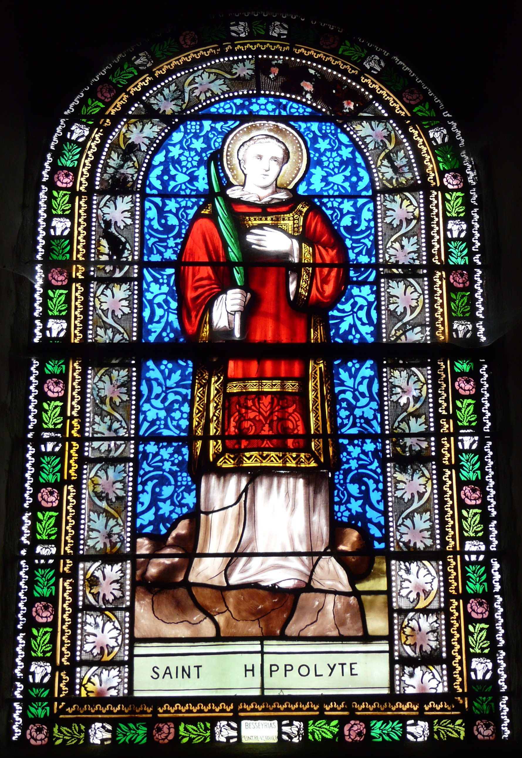 Représentation de saint Hippolyte, vitrail de Jean Besseyrias, église Saint-Hippolyte, Yssandon, Corrèze, France.